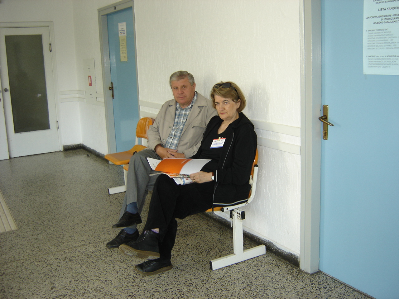 GONG-ova promatračica Vesna Nedić, predsjednica Mirovne grupe Oaza, na biračkom mjestu broj 9 u Domu zdravlja Beli Manastir, na ponovljenim izborima za belomanastirskog gradonačelnika, na slici je i Stojan Alapović, promatrač SDP-a